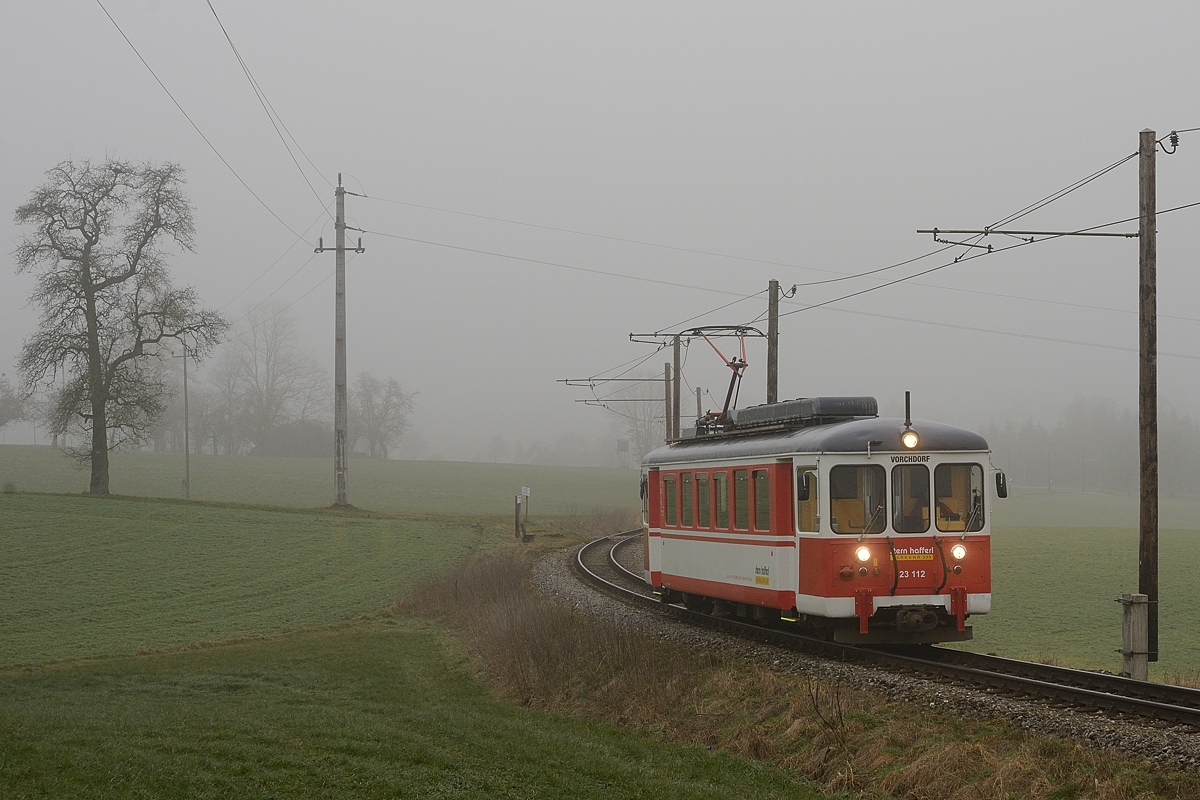 Stern & Hafferl 23.112 bei Neuhub (Hp. Karl z'Neuhub)